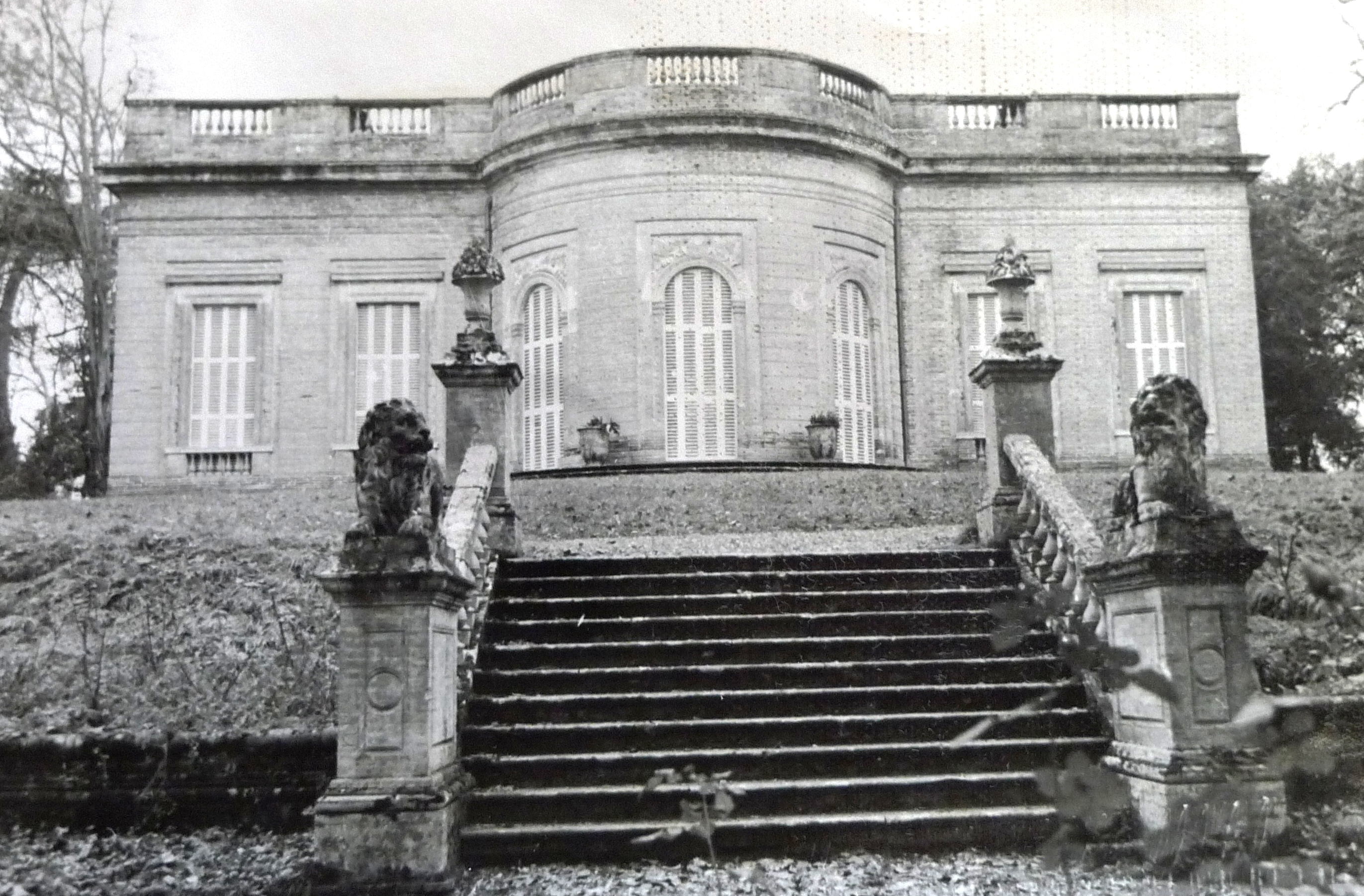 Perron du jardin et façade avec la rotonde du château de Reynerie à Toulouse.